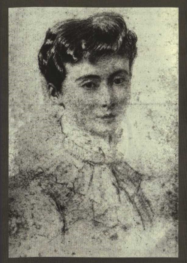 แฟนนี่ น็อกซ์